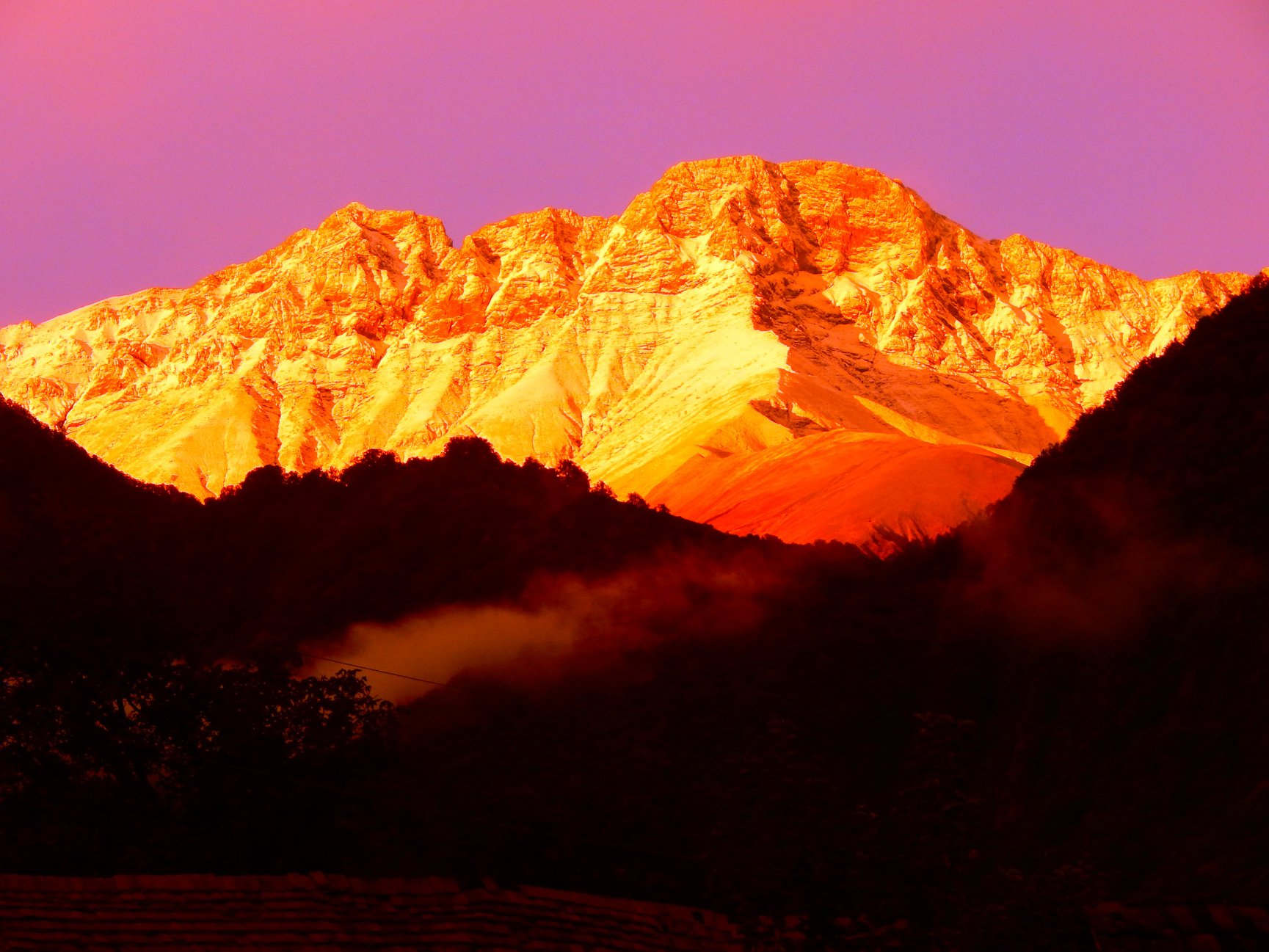 Qısır dağ, Oğuz rayonu Baş Daşağıl kəndi. 2018